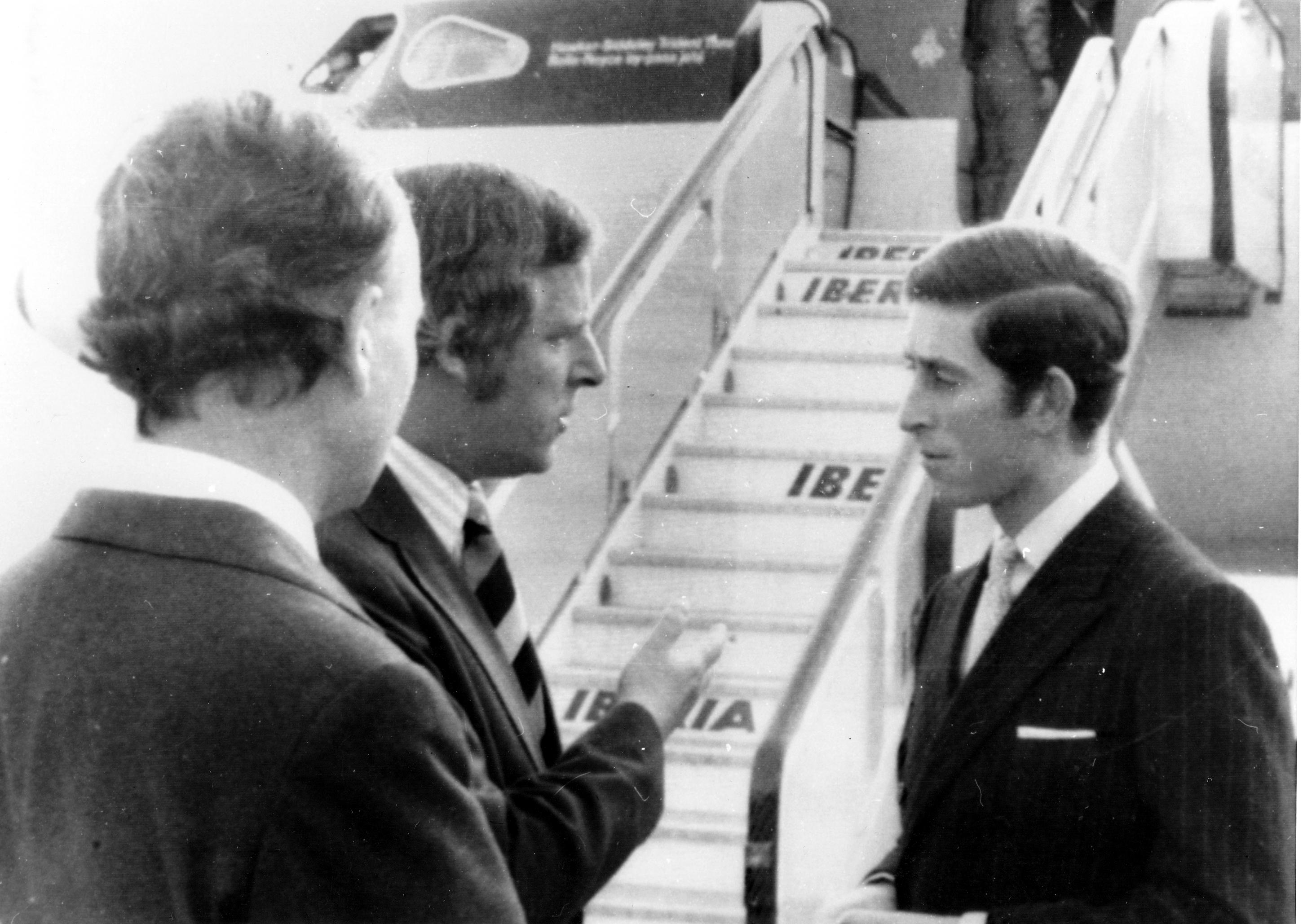 Imagem do Príncipe Carlos, Duque da Cornualha em Madid, em 1973.